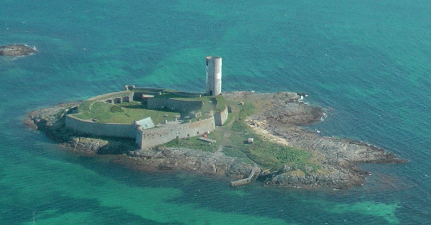 Fort cigogne, vue aerienne, Archipel des Glenans .